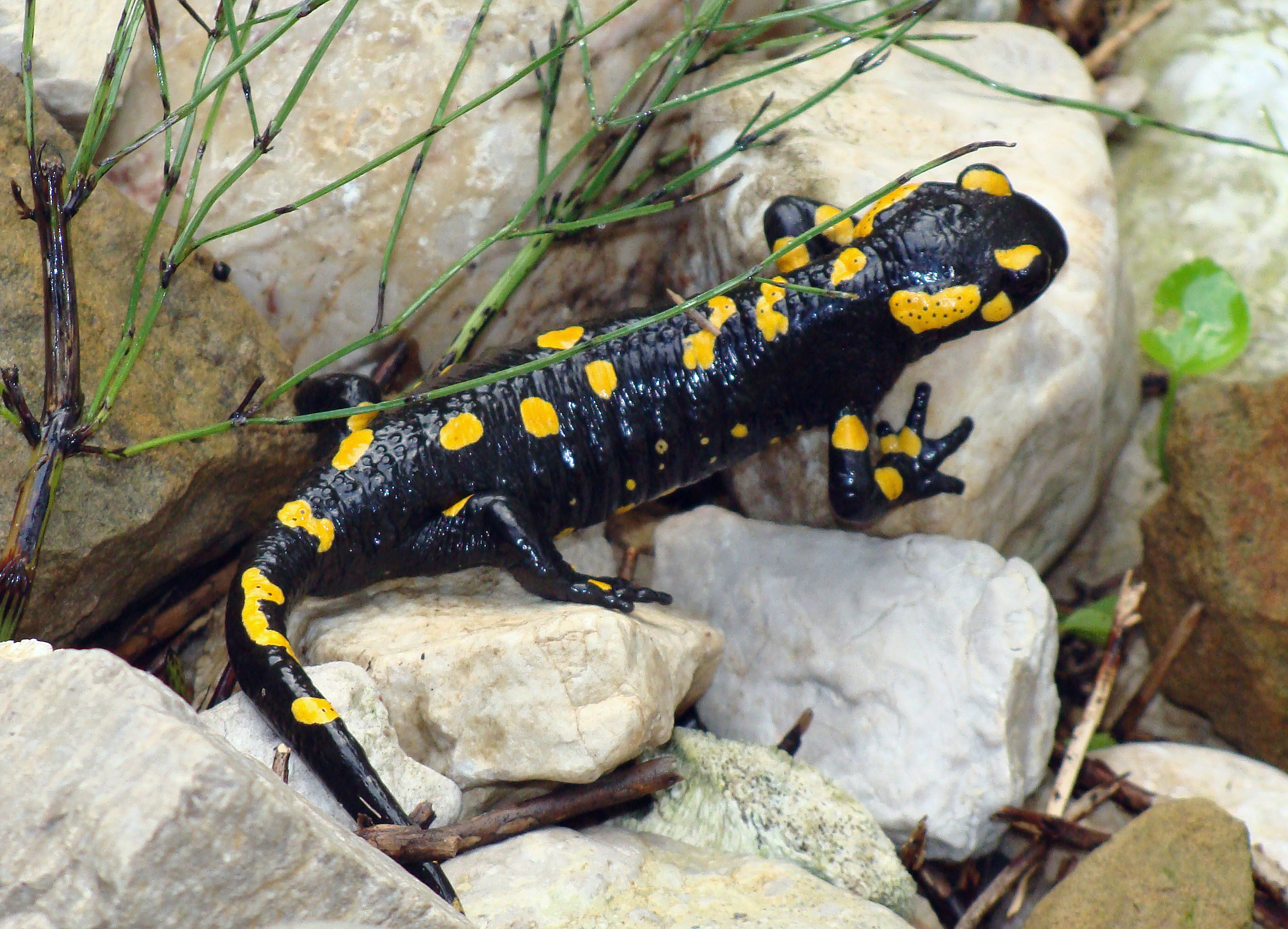 salamandre tachetée (Salamandra salamandra) photographiée le 7 octobre 2010 à Monteaperta (Italie) sortant de sa cache.